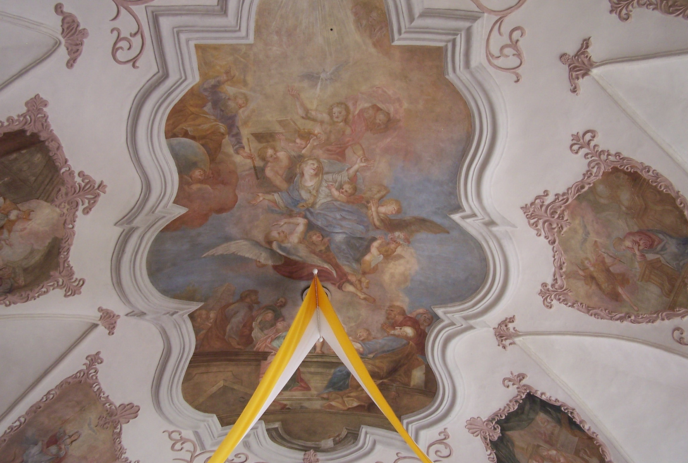 Wörth a. d. Donau. Parrkirche St. Petrus. Gemälde im Chorgewölbe. "Aufnahme Mariens in den Himmel" von Josef Anton März um 1710 im Rahmenstuck. In den Zwickeln Szenen aus dem Leben Mariens.